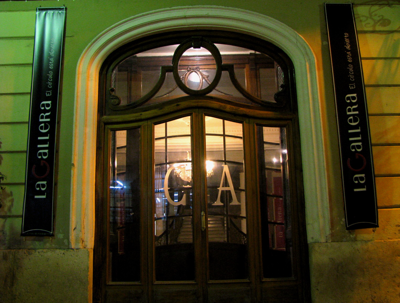 Acceso al vestíbulo principal.